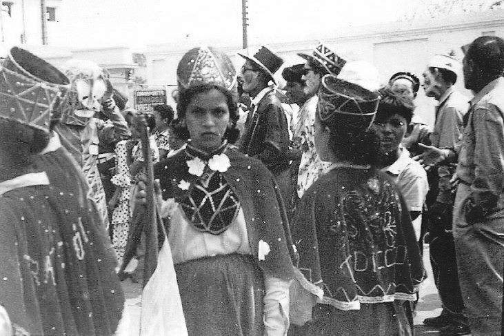 Carnavales de Baranquilla - Colombia 1959